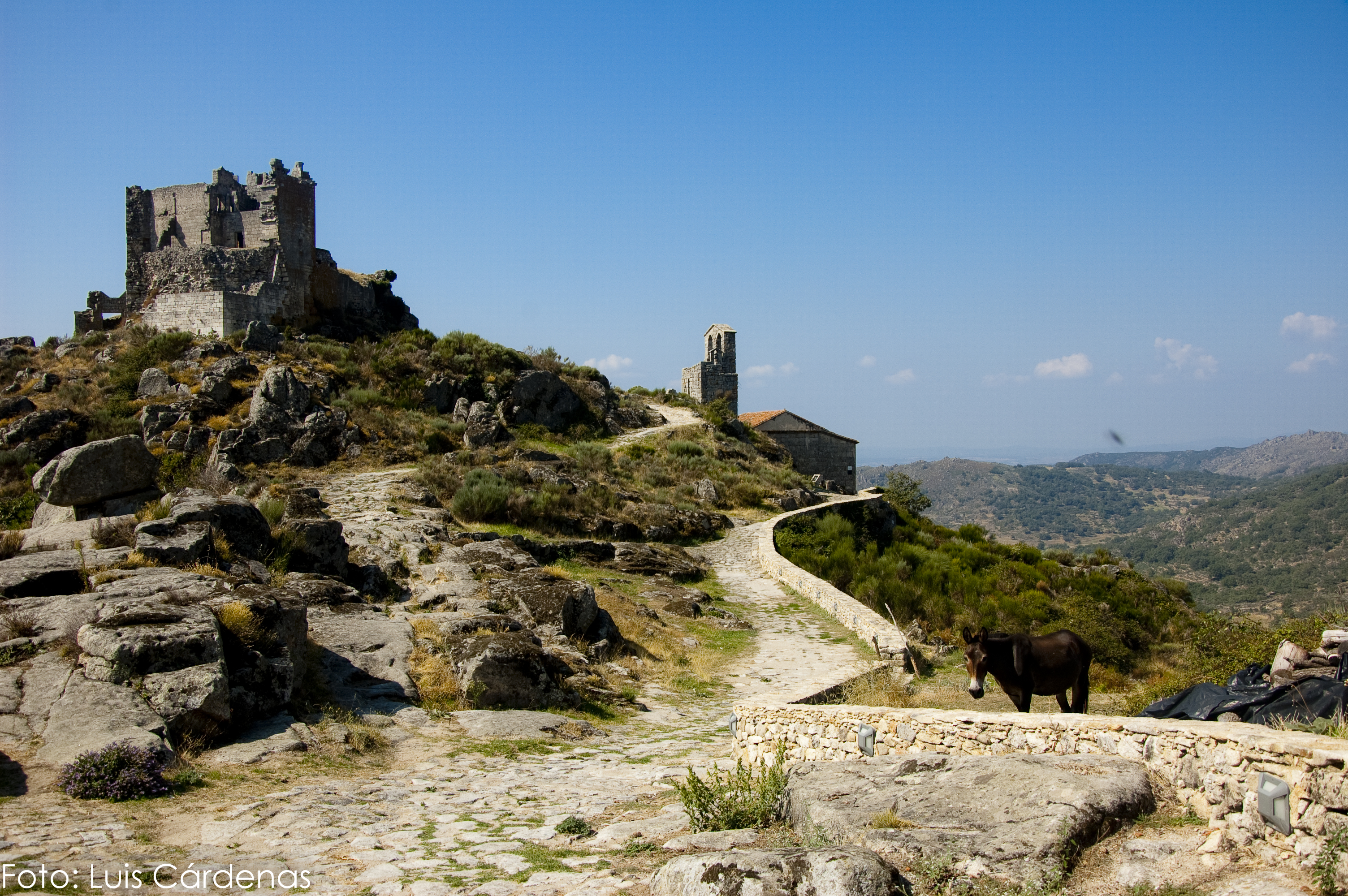 Camino al Castillo de Trevejo